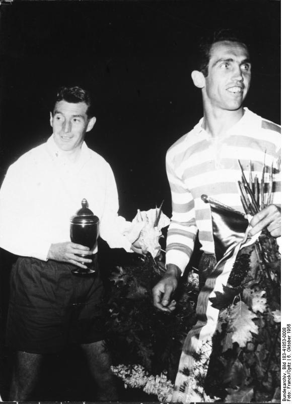 Zentralbild/Franck/Opitz 7.10.1956 SC Wismut Karl-Marx-Stadt unterlag 1. F.C.Kaiserslautern 5:3 Der 2. Fussballgrosskampf am gestrigen Sonnabend, dem 6.10.1956, zwischen dem 1. F.C.Kaiserslautern und dem SC Wismut Karl-Marx-Stadt unter Tiefstrahlern im Leipziger Zentralstadion wurde ein Triumph vor hunderttausend Zuschauer der Lauterer. UBz: Die beiden Mannschaftskapitäne Fritz Walter (1.FC) und Bauer (rechts).